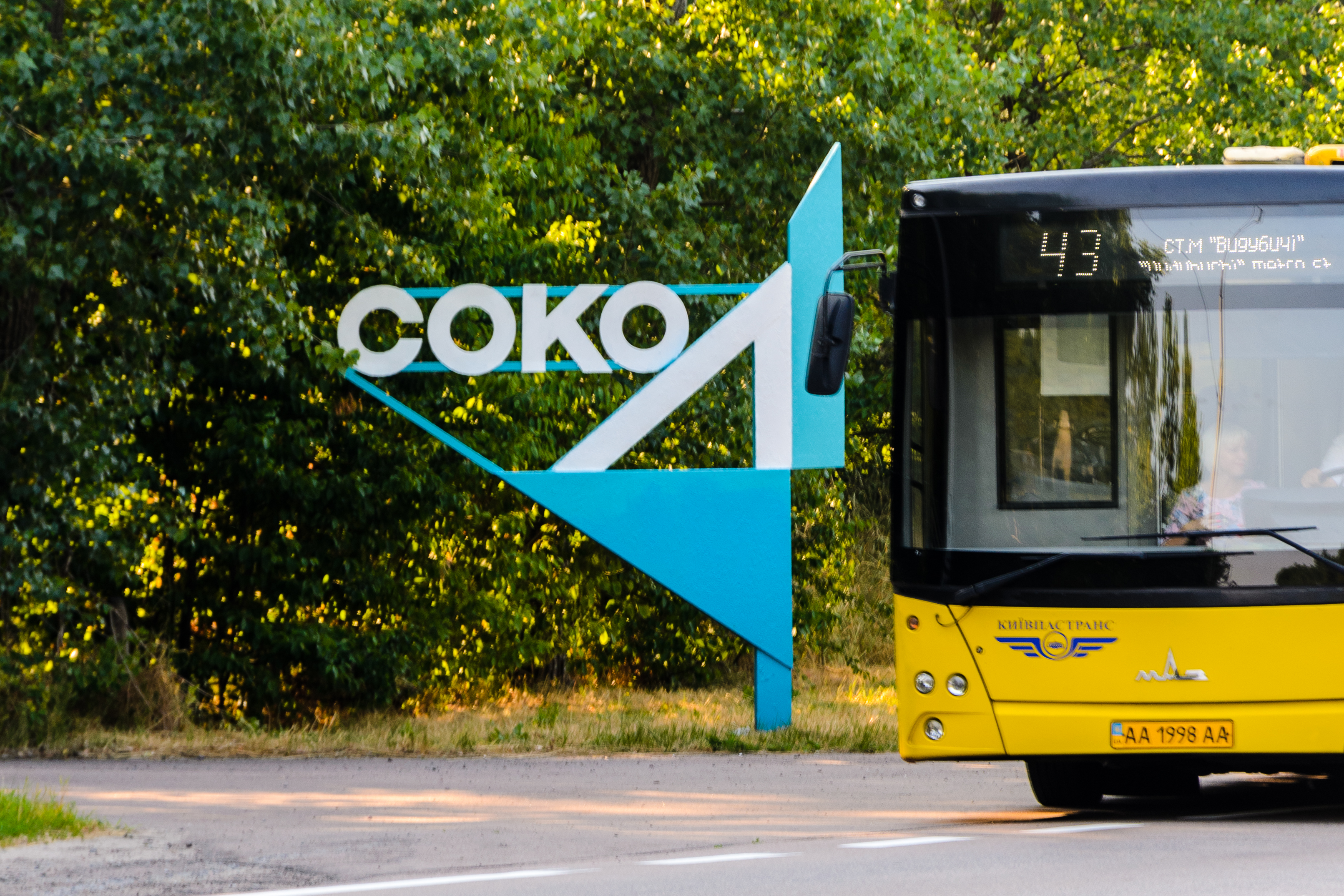 Зупинка